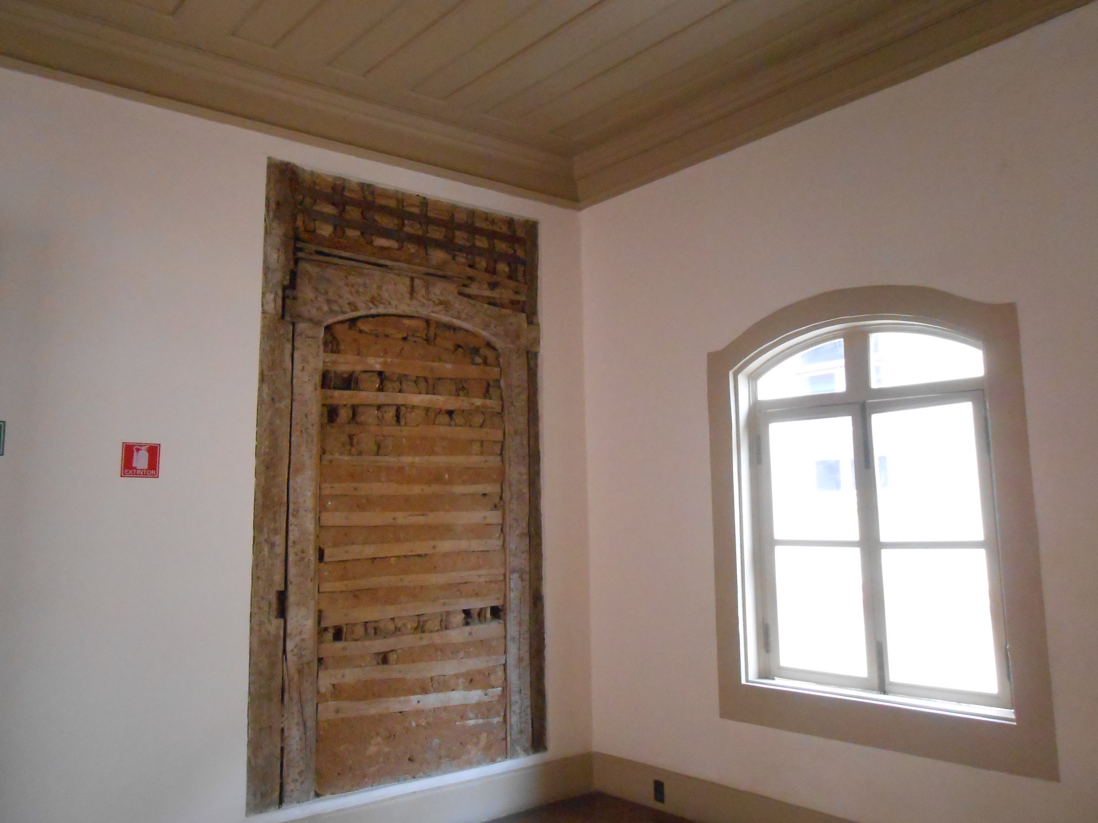 Detalhe da parede original do Solar da Marquesa de Santos